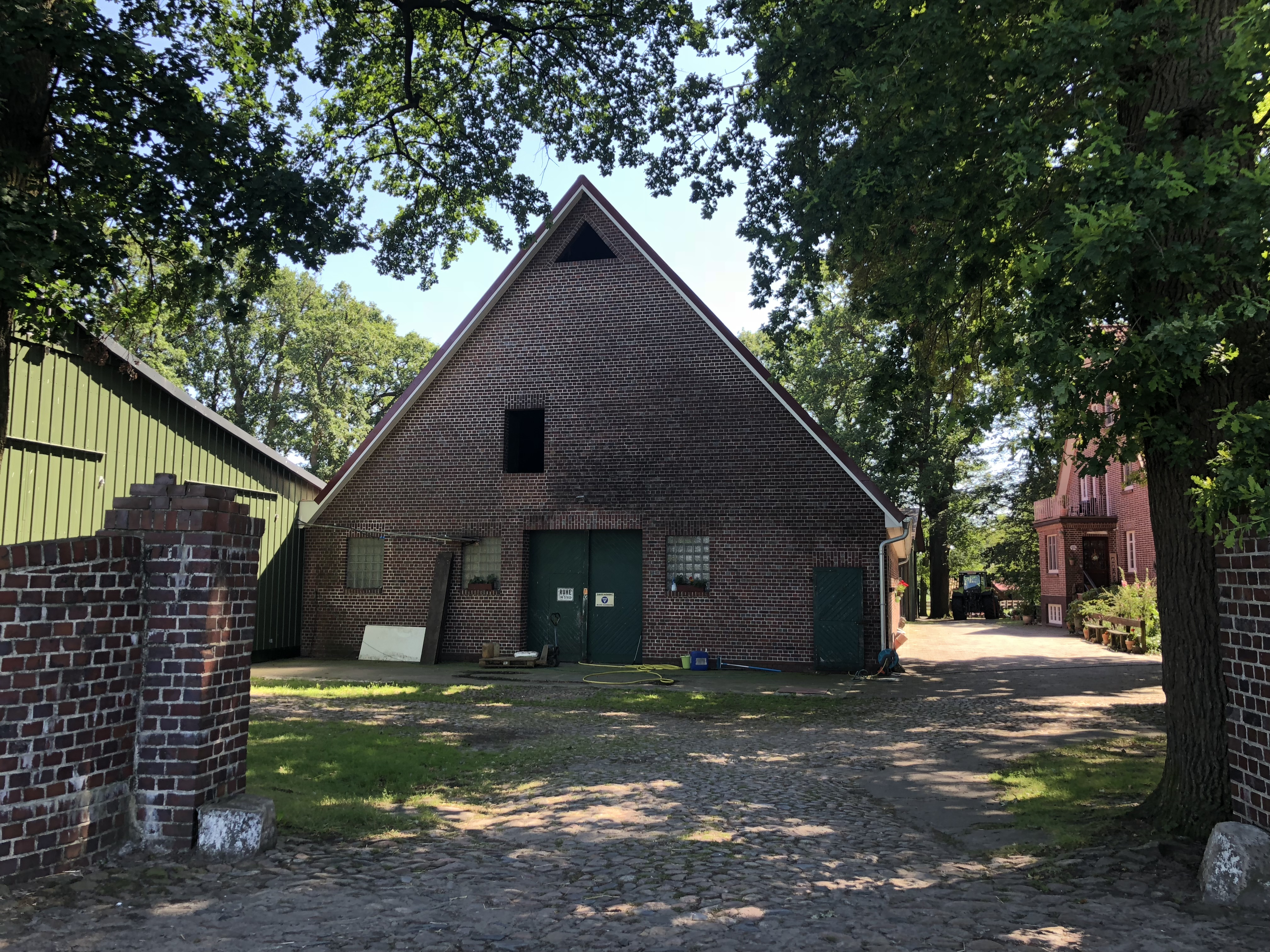 Buurnhuus in Bredenhoorn